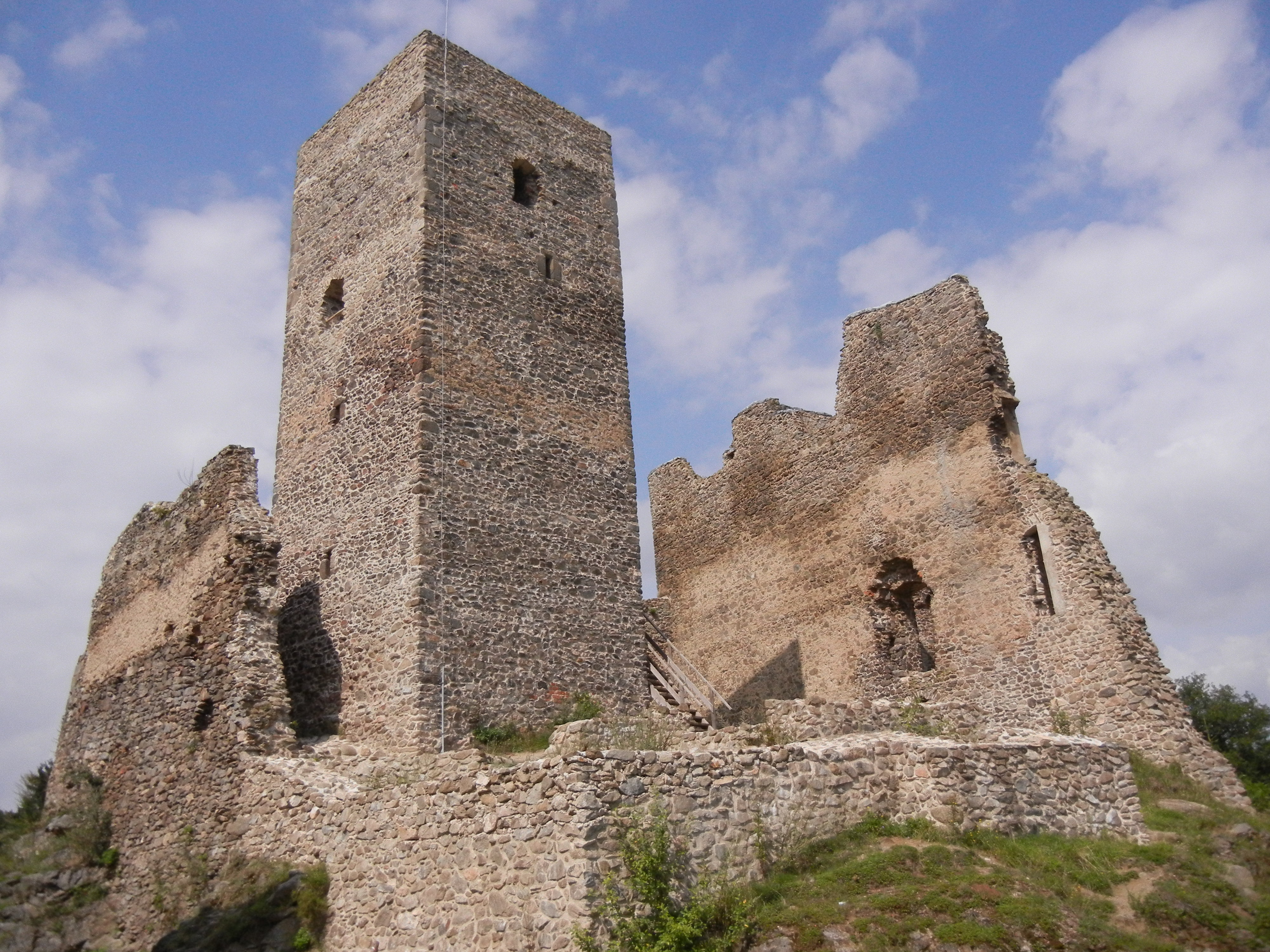 Hrad Rokštejn, zřícenina (Panská Lhota), Panská Lhota